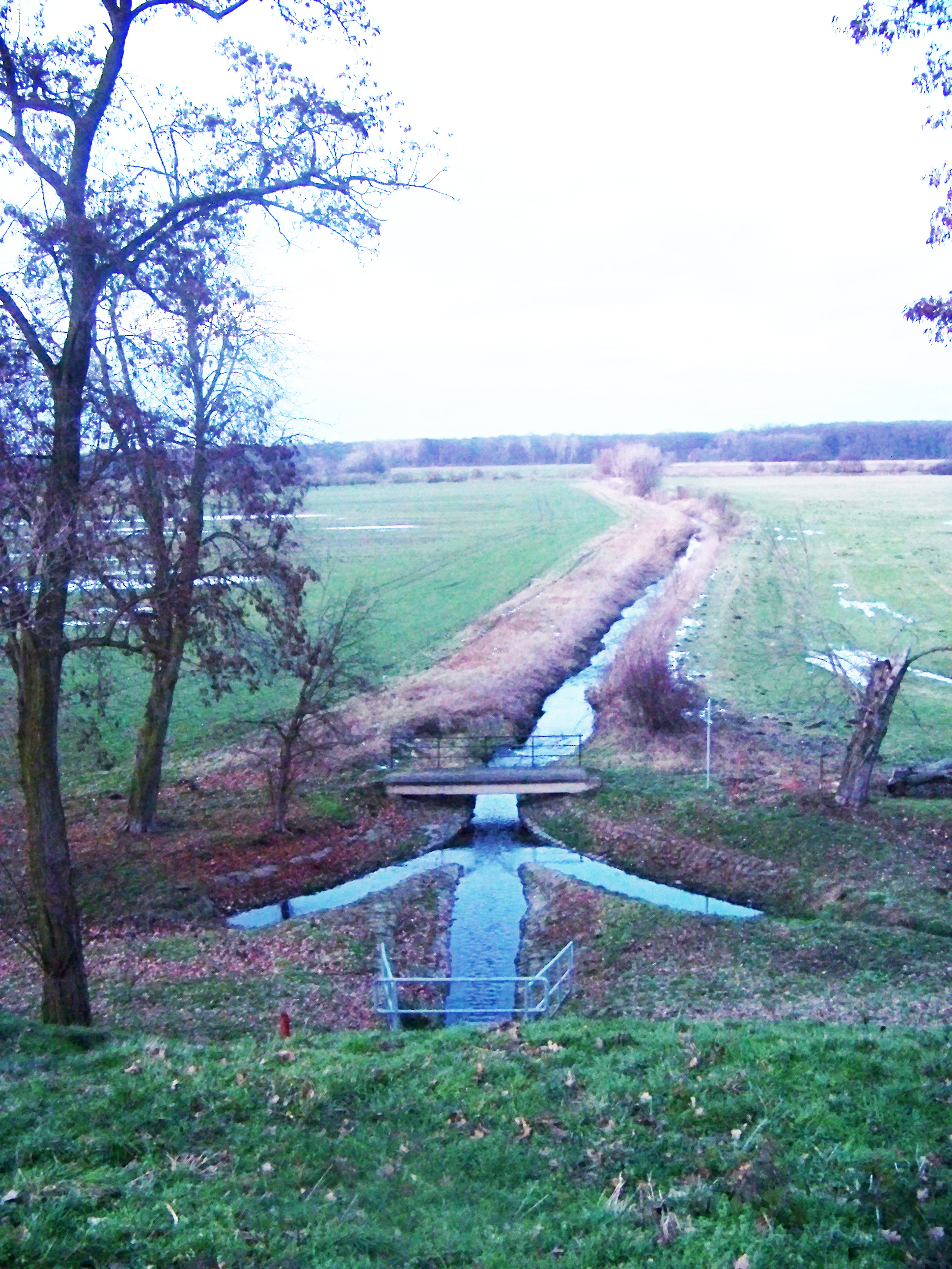 Zschampert, Blick vom Damm des Elster-Saale-Kanals